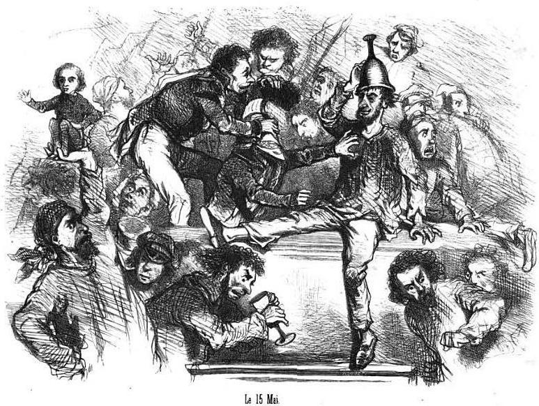 Caricature de Cham représentant l'intrusion des manifestants dans l'Assemblée nationale constituante (15 mai 1848). Un des manifestants tient Louis Blanc dans sa main.